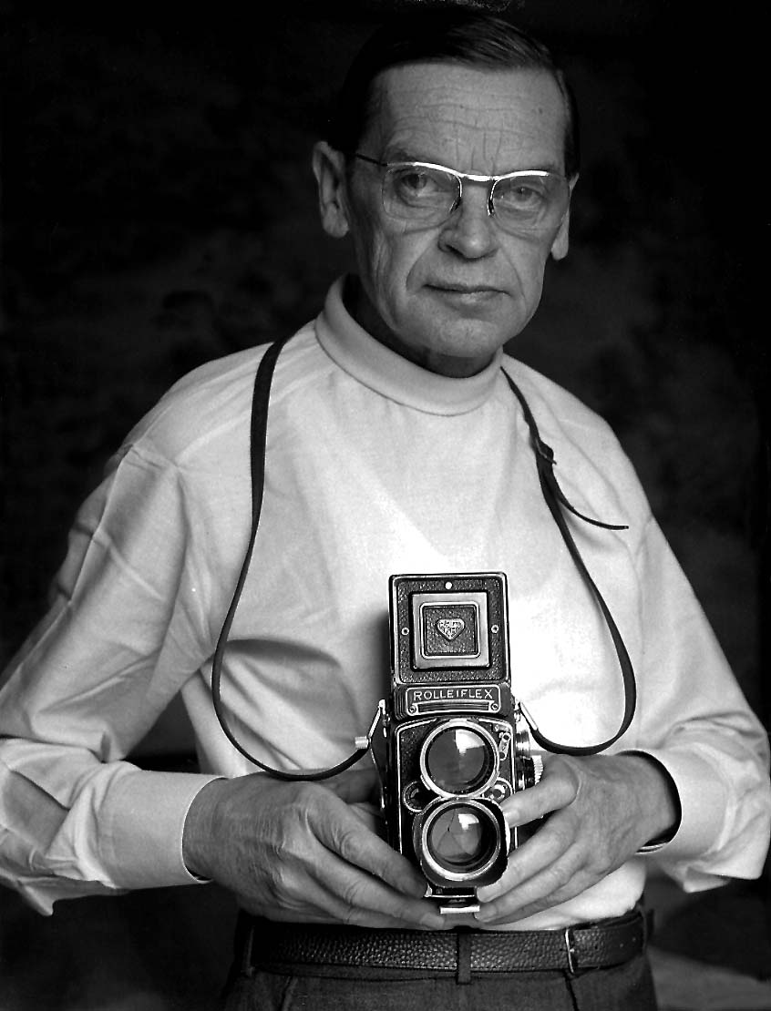 Portrait von Walter Dick mit seiner bevorzugten Kamera Rolleiflex.